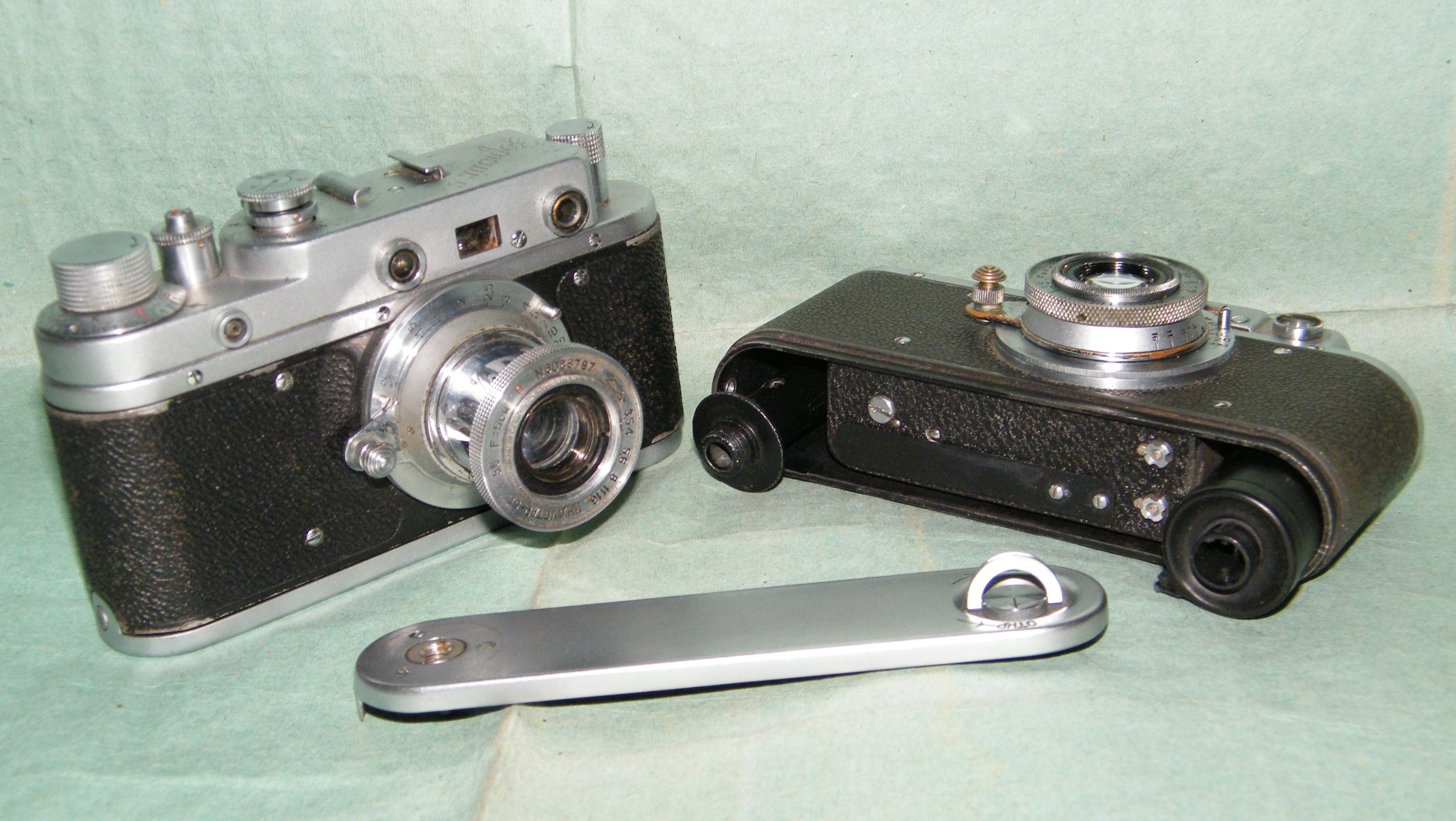 Зоркий и Зоркий-С (КМЗ)